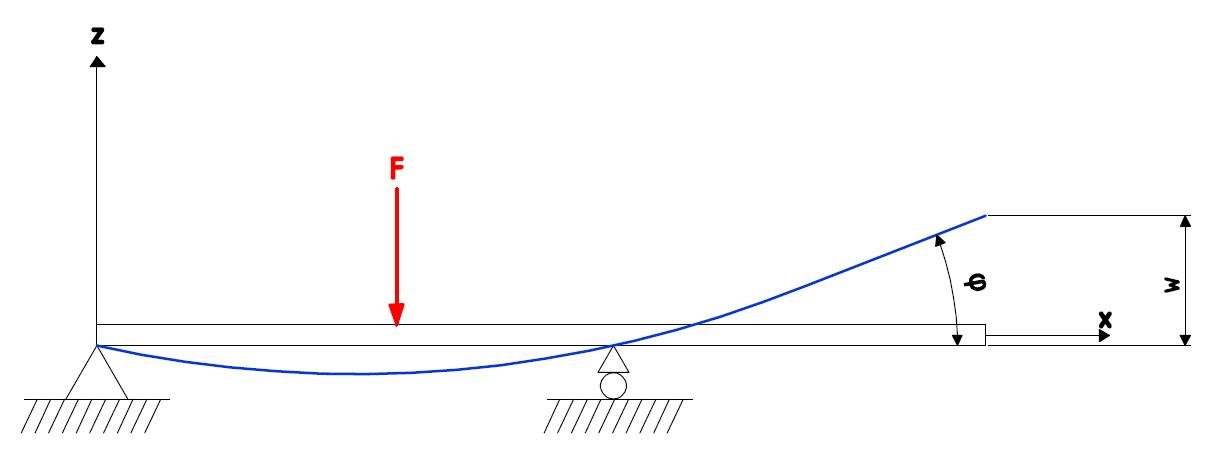 segédlet a Betti-tétel szócikkhez